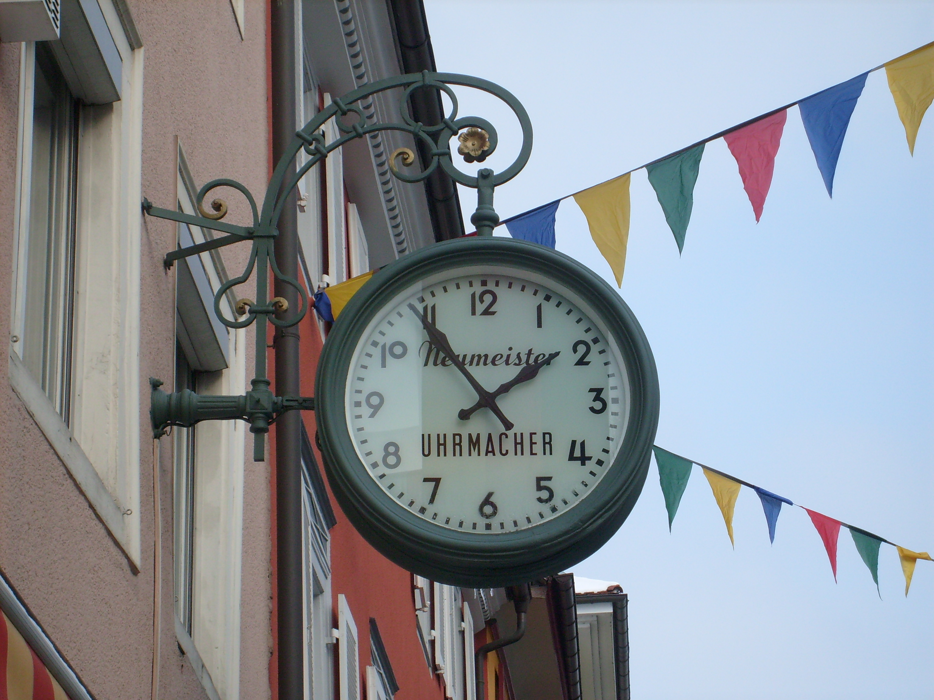 Deutschlands älteste noch funktionierende elektroautomatische Außenuhr. Stockach im Februar 2010.